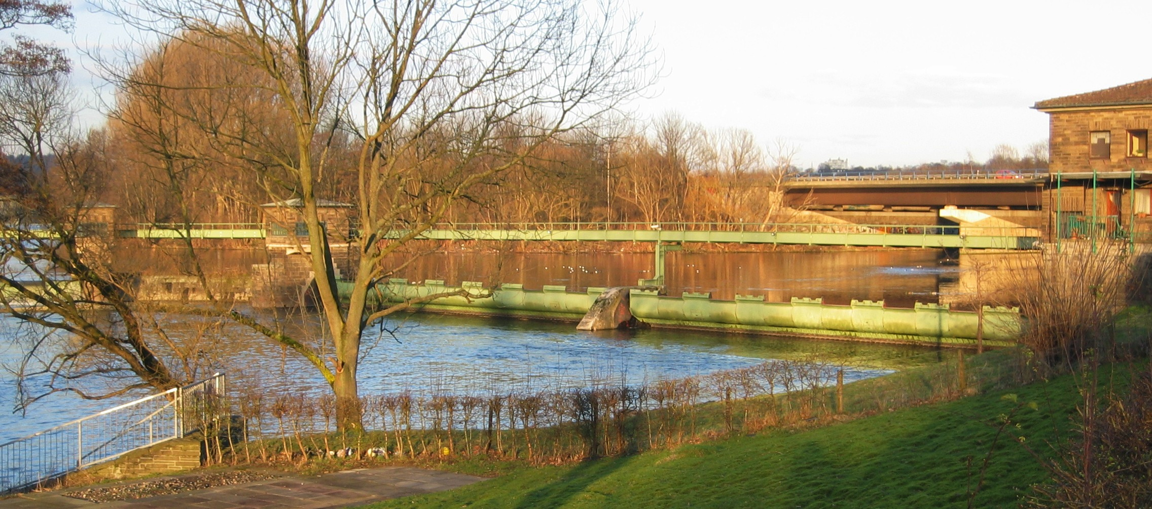 Das Stauwehr „Stiftsmühle“ in Hagen-Vorhalle (das Gebiet gehörte bis 1964 zu Herdecke). Links die Ruhr, rechts die Volmemündung und das Gebäude des Ruhrverbands (im Hintergrund die Autobahnbrücke der A 1).